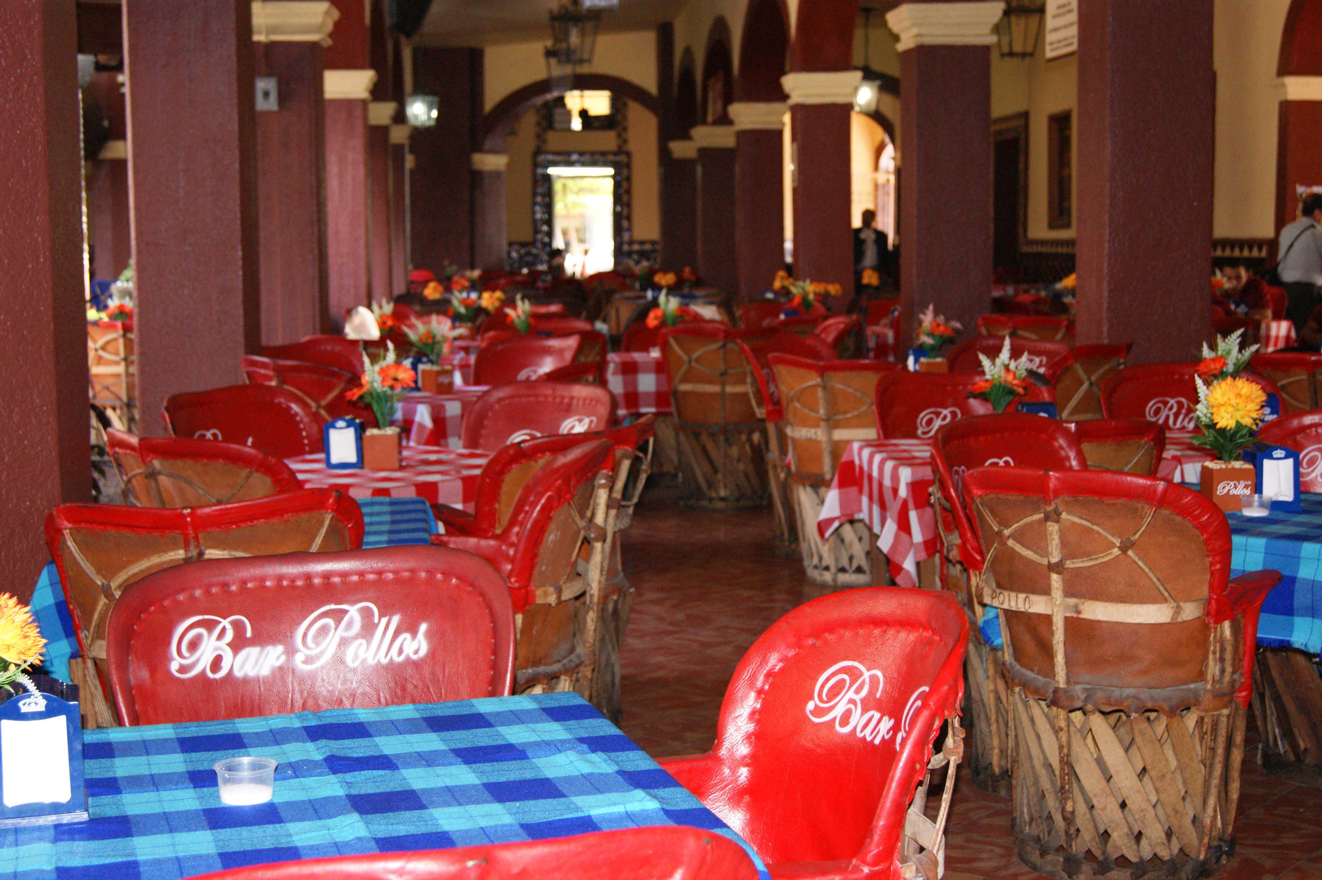 Considerado como uno de los mayores atractivos turísticos de Guadalajara, El Parían en Tlaquepaque, Jalisco México. Centro gastronómico y de entretenimiento.